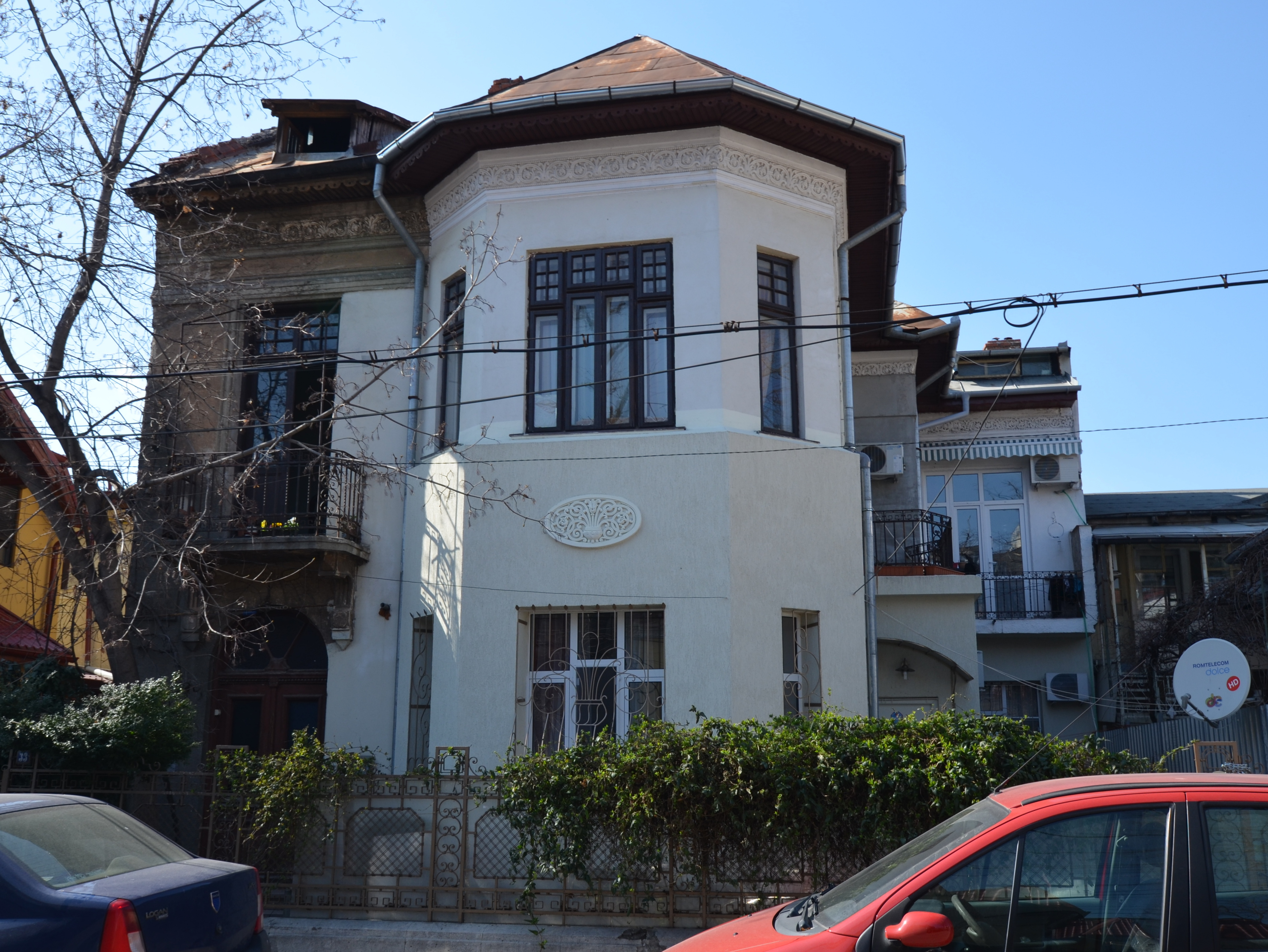 Casă, Str. Vlad Județul nr. 33